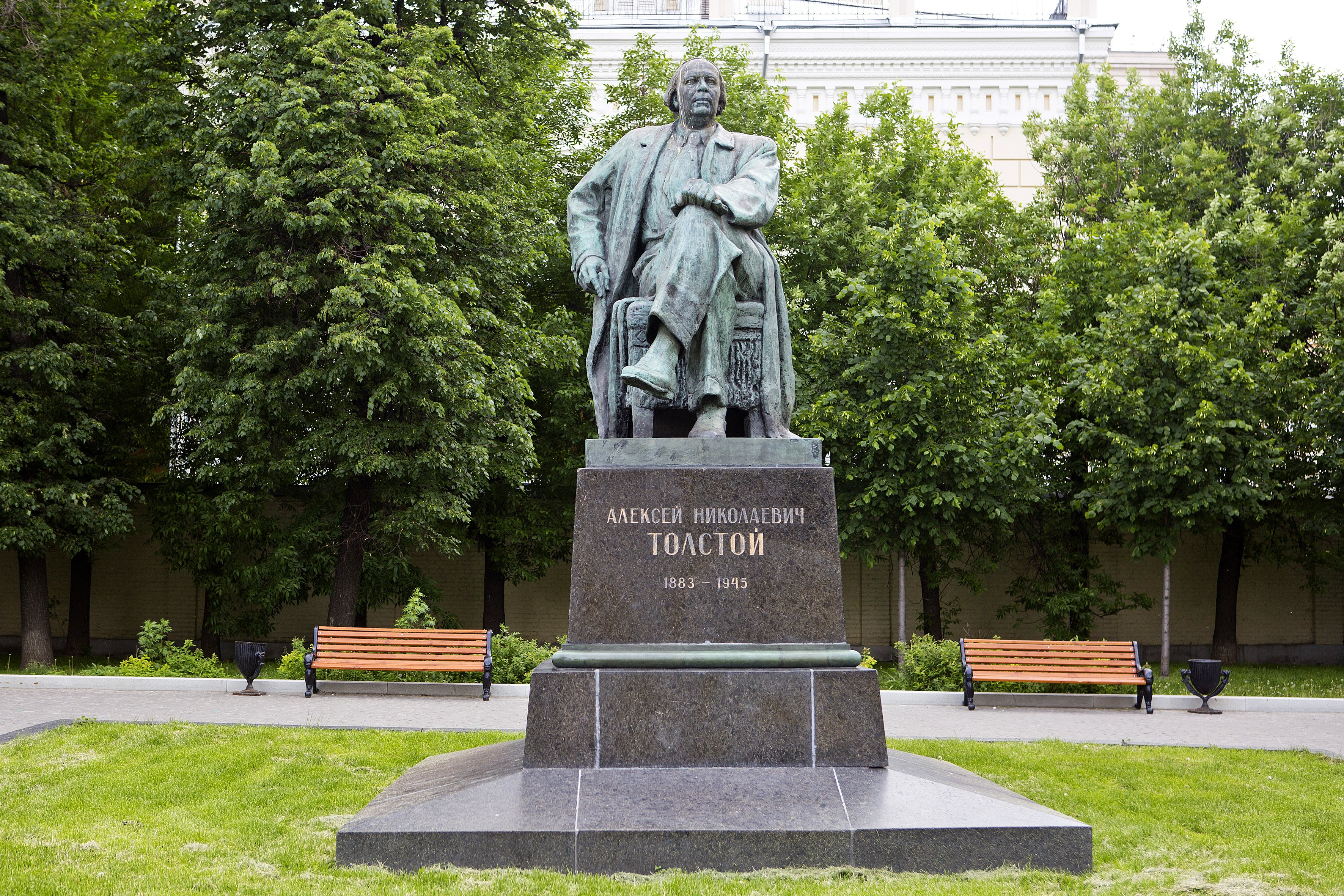 Памятник Алексею Толстому на пересечении Большой и Малой Никитской улицы